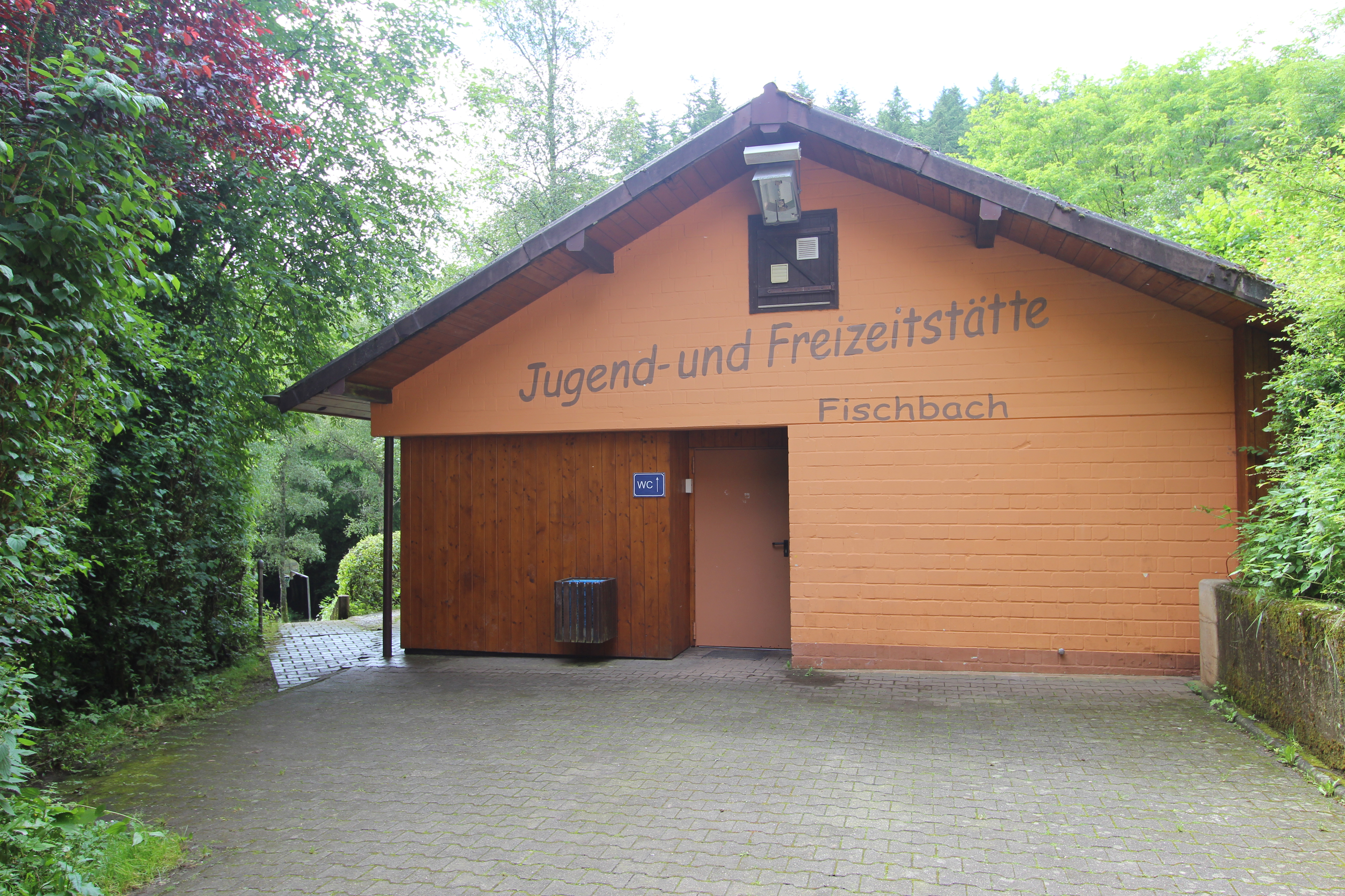 Jugend- und Freizeitstätte in der Talstraße 2, 54675 Fischbach-Oberraden.